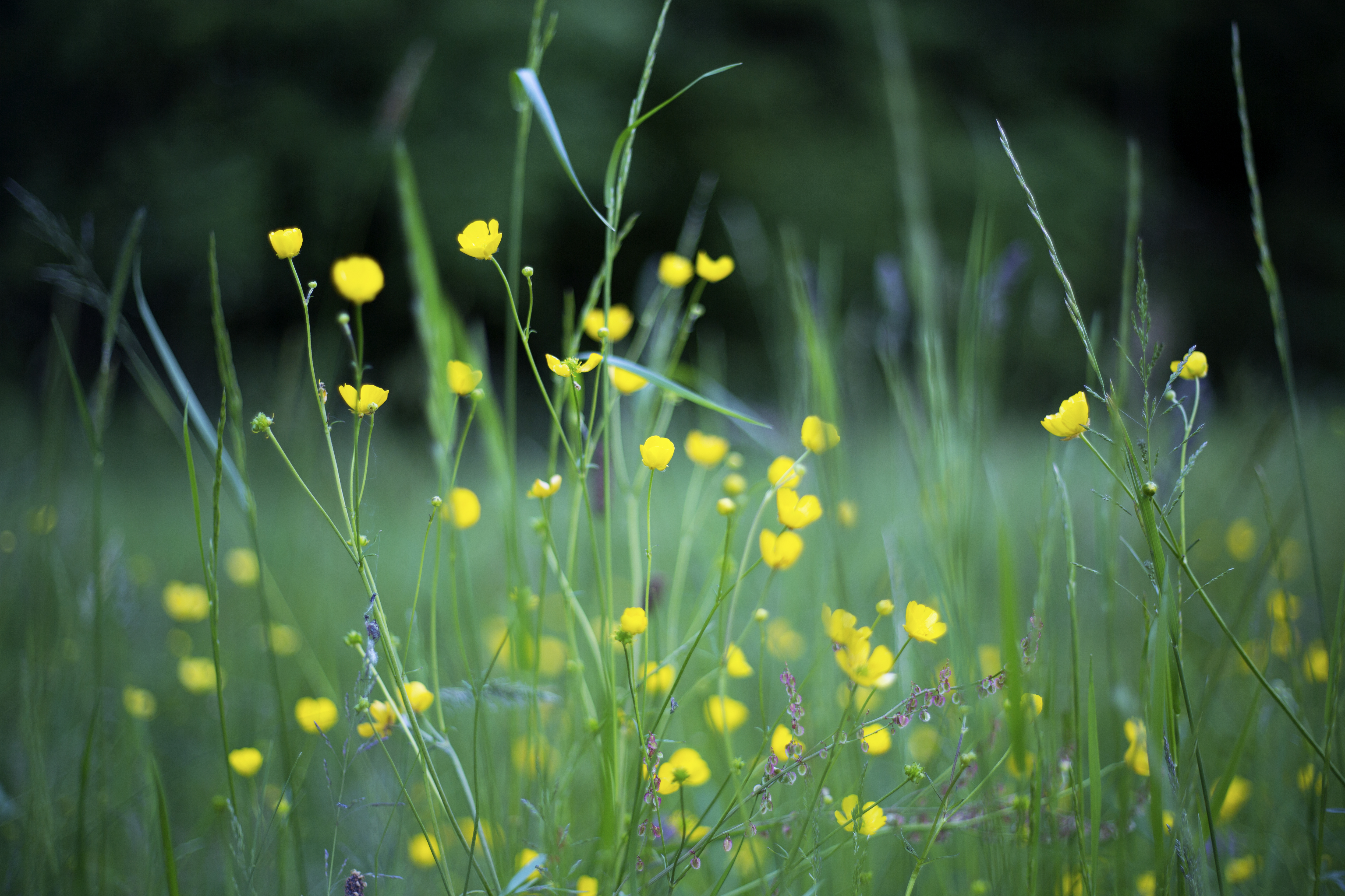 Pflanzen im Naturpark Schwäbisch-Fränkischer Wald in der Nähe des Finsterroter Sees, Baden-Württemberg, Deutschland.